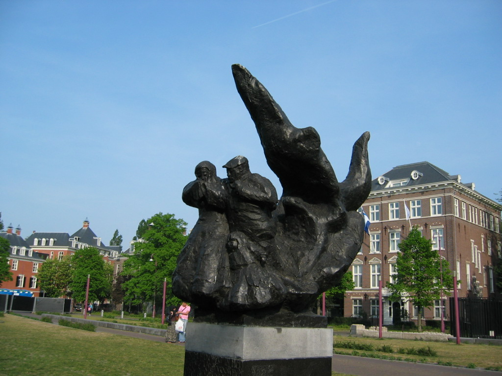 Foto van het Zigeunermonument Hel en vuur op het Amsterdamse Museumplein